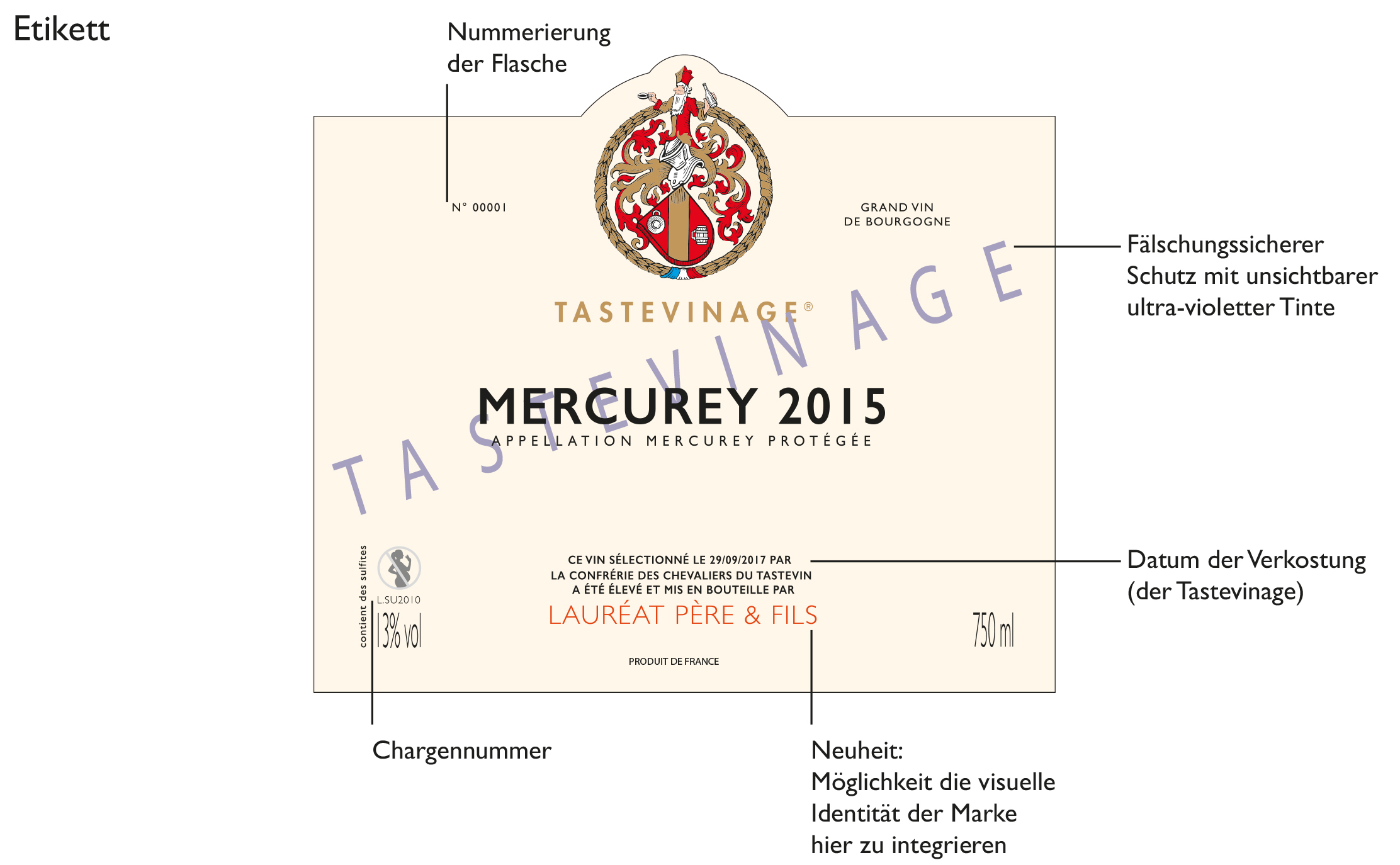 Tastevinage l'étiquette allemand